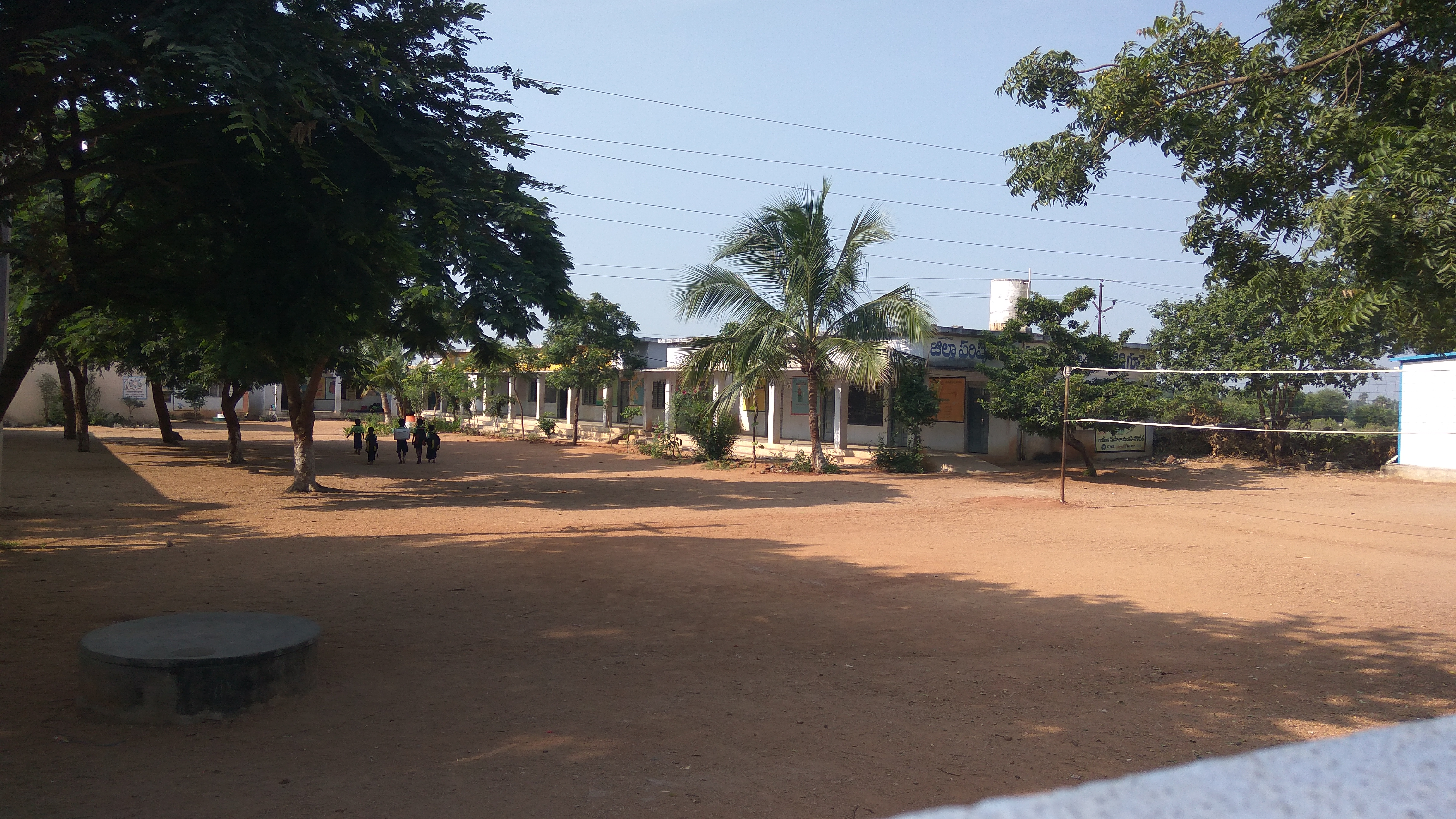 ముత్తిరెడ్డి గూడెంలోని పాఠశాల